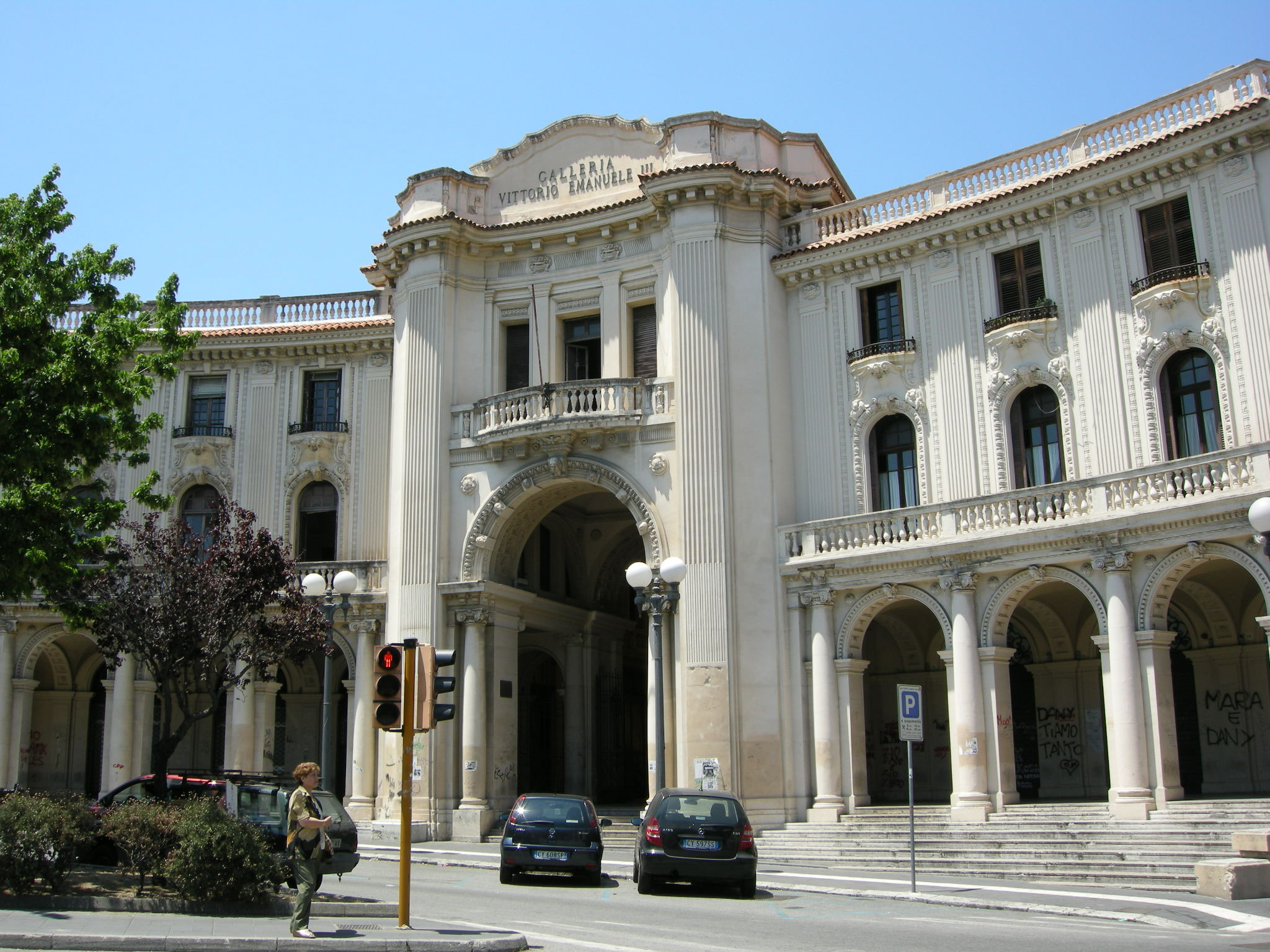 Galleria Vittorio Emanuele III (Messina)